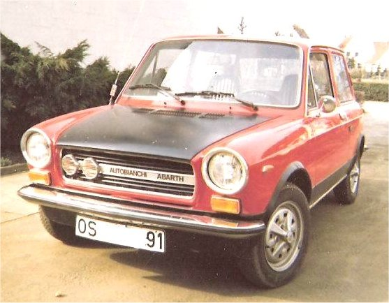 Autobianchi A112 Abarth 1ª serie del 1972